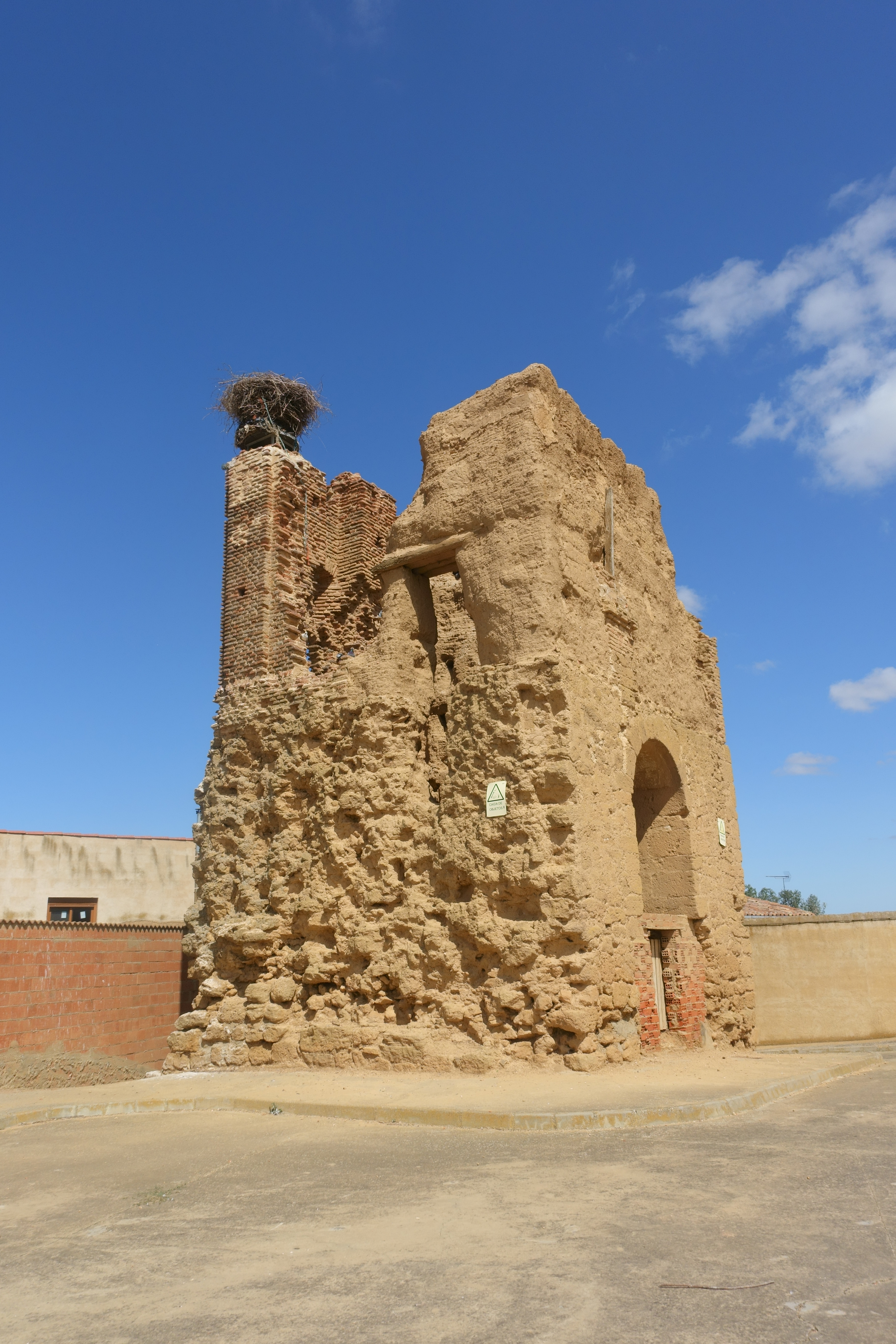 Restos de la torre de la antigua iglesia de San Pedro, Valdunquillo (Valladolid, España).